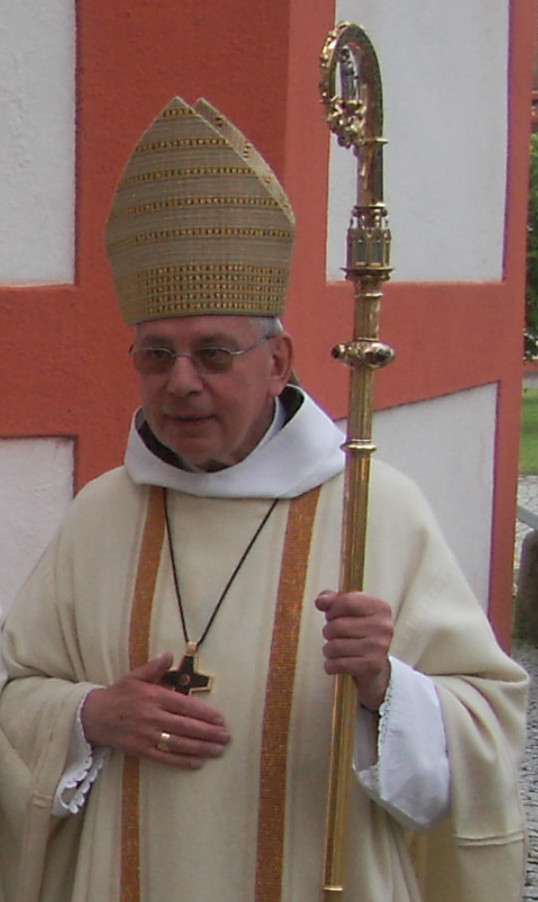 Abt Thomas Denter mit Mitra und Stab